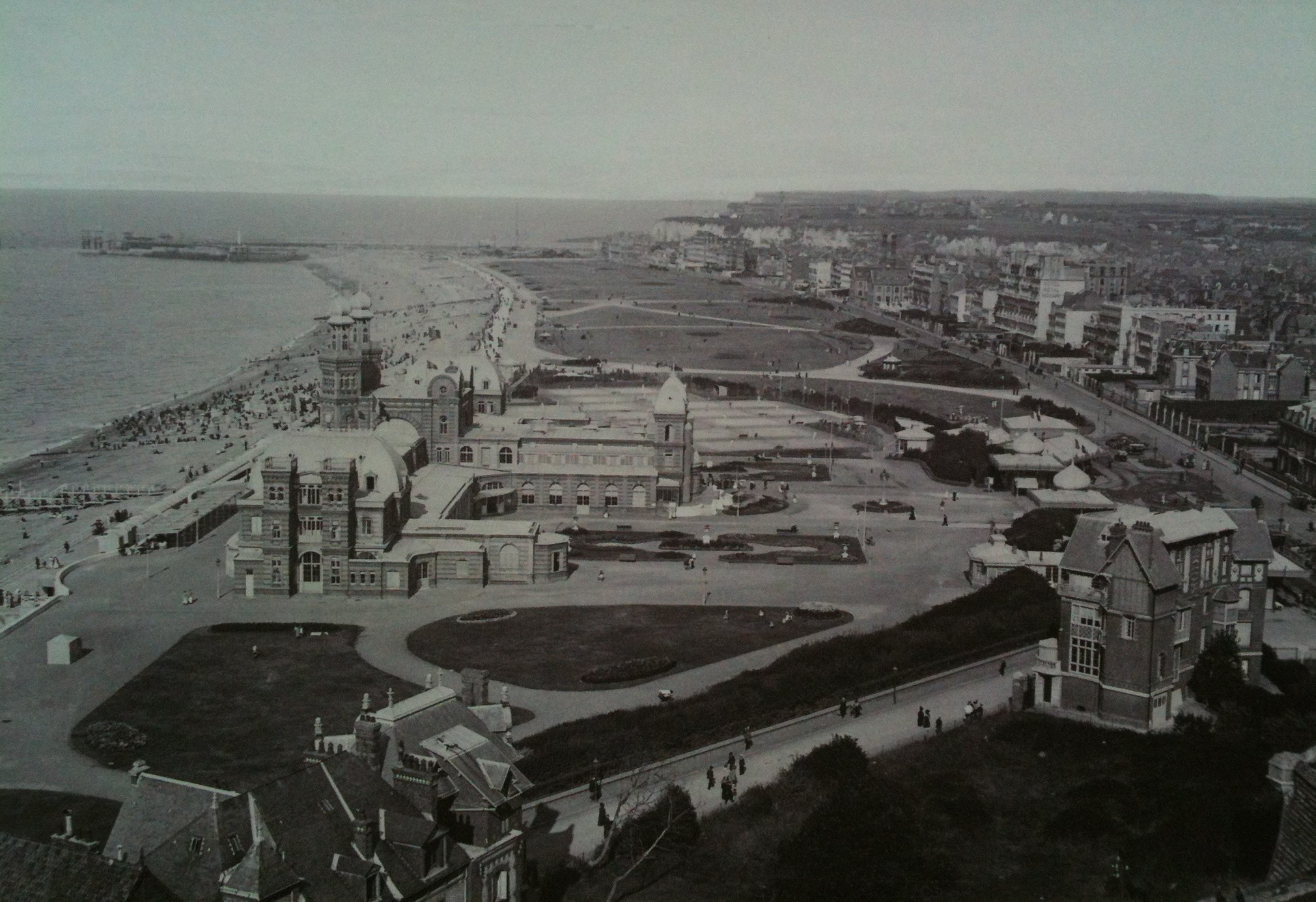 Front de mer de Dieppe avant 1914